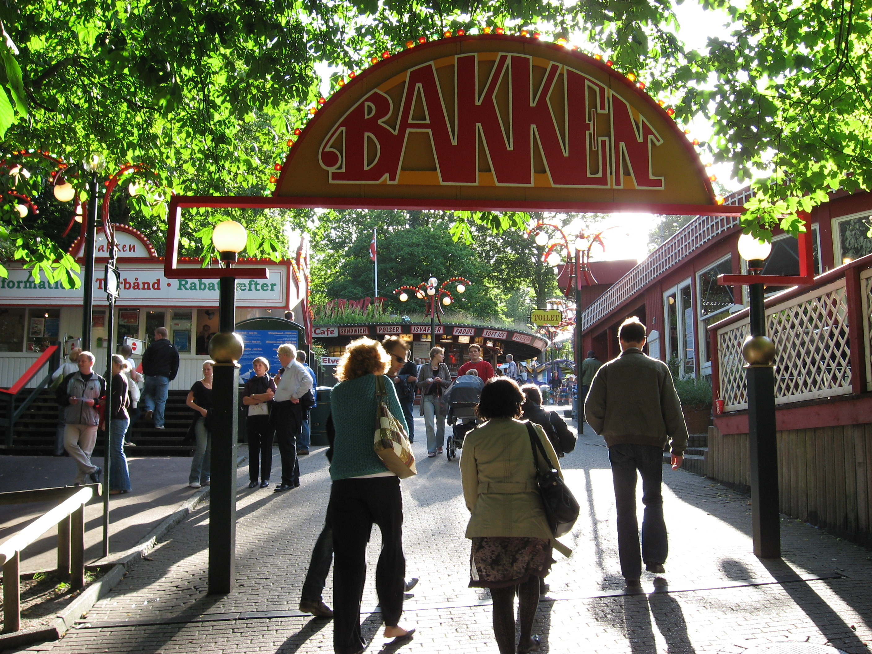 The entry of Bakken amusement park in Denmark.